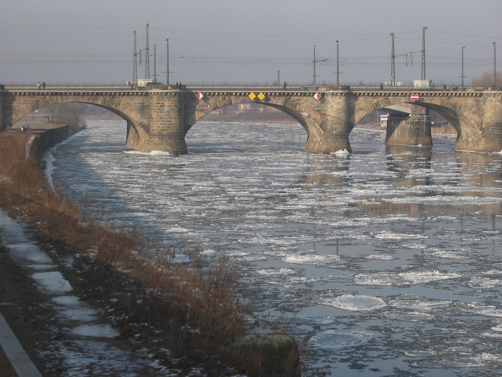 Eisgang auf der Elbe in Dresden am 29. Januar 2006. Blick vom linken Ufer am sächsischen Landtag auf die Marienbrücke.